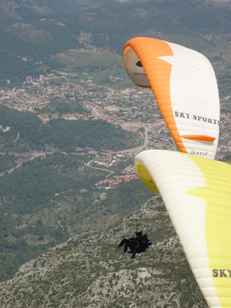 paragliding from babadag 2000m. Paraglider: Bi-Beta2 (Advance)